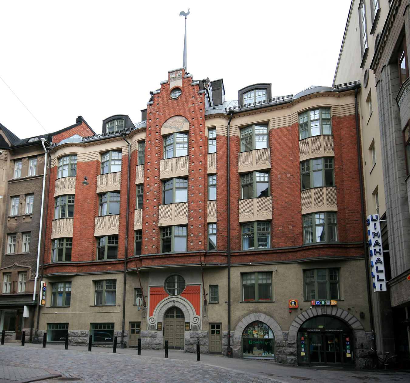 Yrjönkatu 23, Helsinki. Arkkitehti: Gunnar Stenius. Rakennusvuosi: 1908.